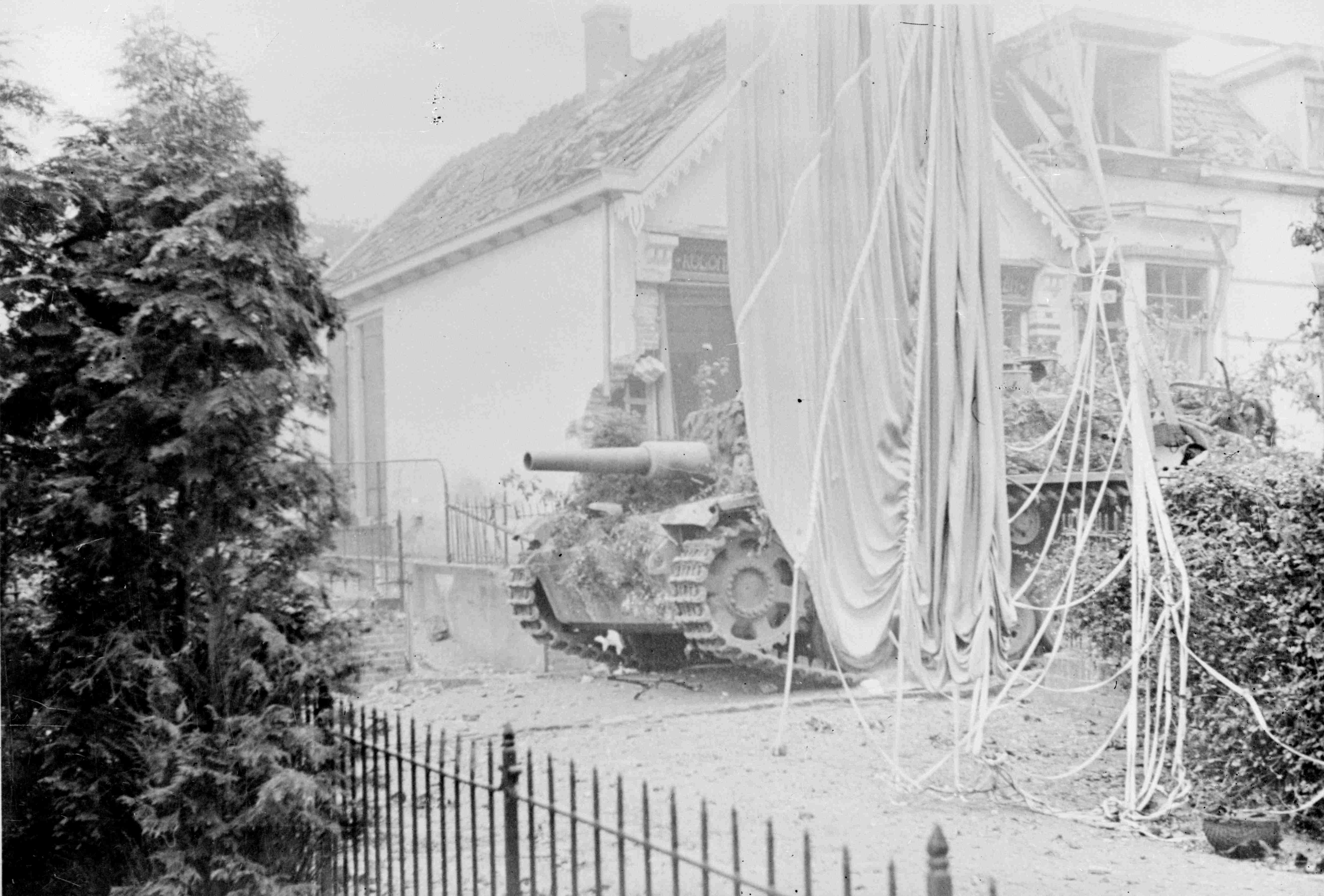 10,5cm Sturmhaubitze 42, Middelzware Duitse tank (PzKpfw III G.) bedekt met een Engelse parachute in een onbekende straat in Oosterbeek